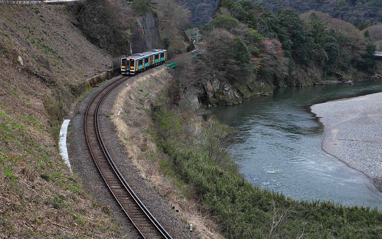 JR East Kiha E130 series DMU (Kiha E131+Kiha E132, Shimo-Ogawa Stn. - Saigane Stn.)